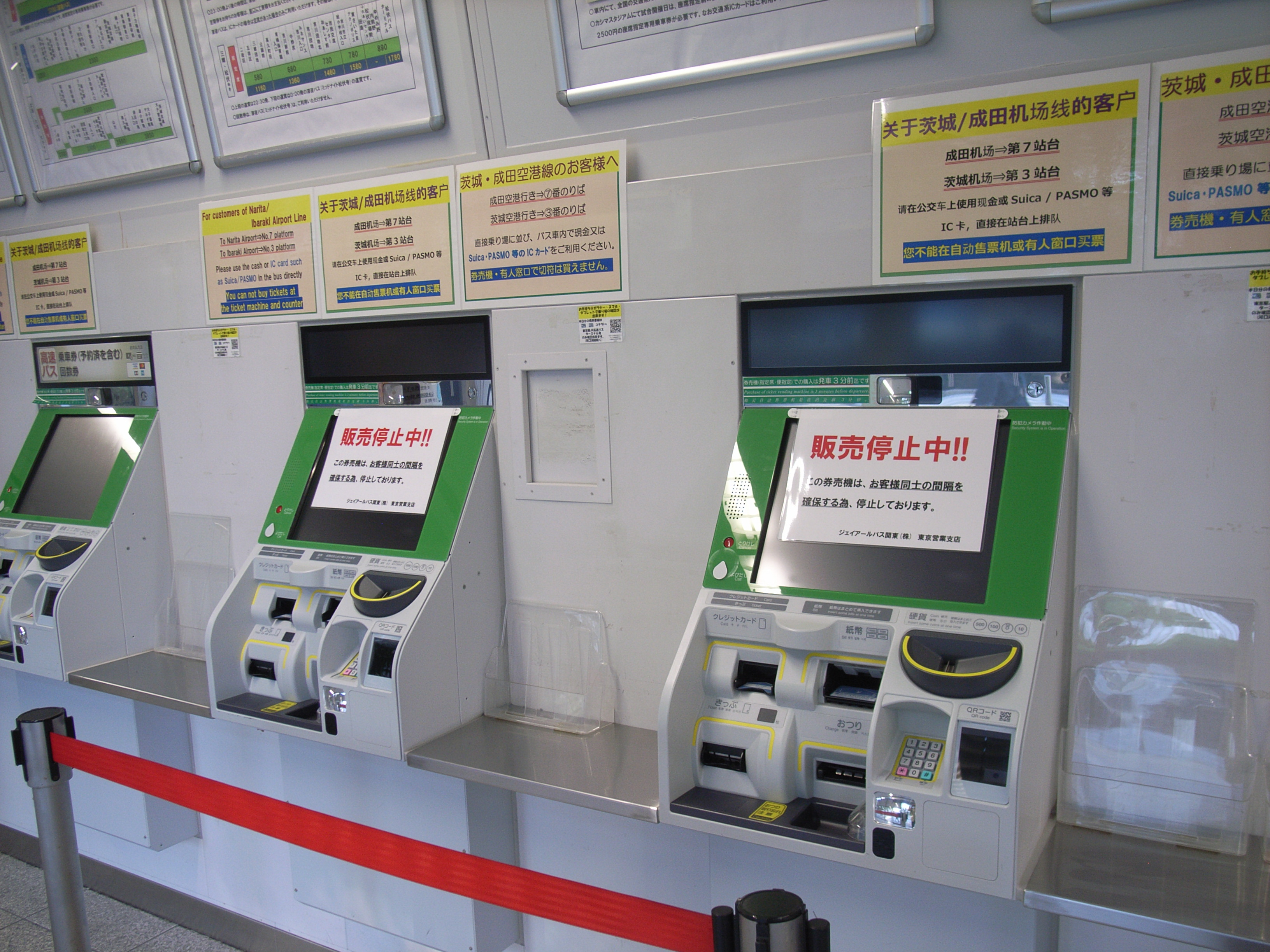 新型コロナウイルスの影響で利用者が減ったため、券売機も稼働数を減らしている